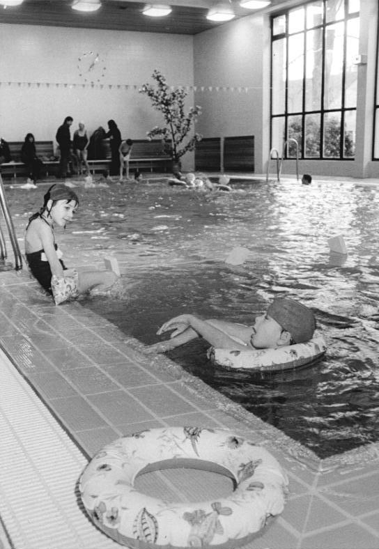 ADN-ZB Zimmermann 24.1.90 Bez. Frankfurt-O.: In der Waldsiedlung Wandlitz, dem im Norden Berlins gelegenen Wohnobjekt der ehemaligen SED-Führung, treten am 20.2.90 die ersten 70 Patienten eine Kur an. In dem im Aufbau befindlichen Rehabilitations-Sanatorium Bernau-Waldfrieden sind in diesem Jahr noch 1.500 bis 2.000 vierwöchige Genesungsaufenthalte vorgesehen. Ende 1990 sollen in der Einrichtung 300 bis 330 Heilbedürftige gleichzeitig versorgt werden. Die Schwimmhalle wird bereits von Schülern aus Wandlitz genutzt.